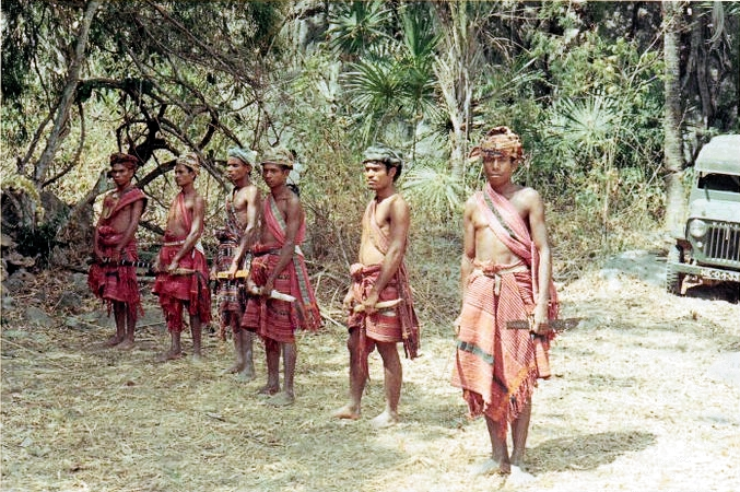 Moradores